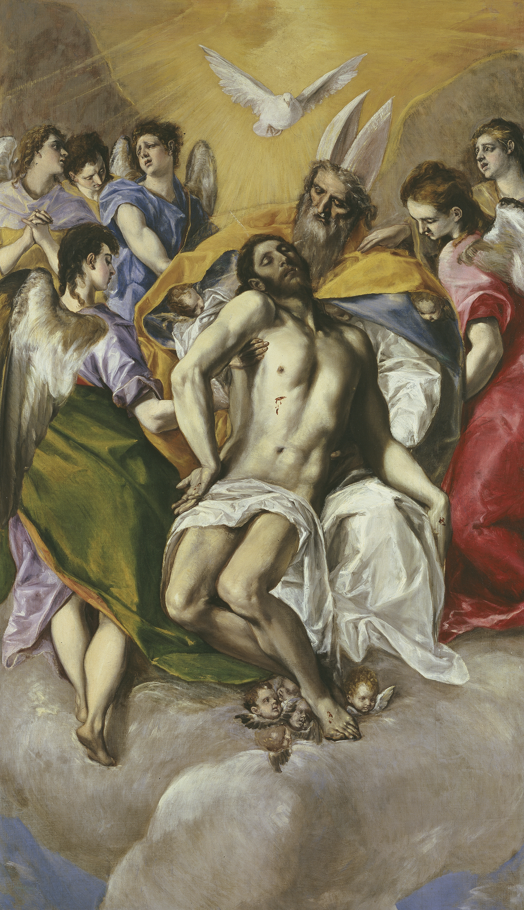 Esta obra, que representa a los tres miembros de la Santísima Trinidad, fue realizada por El Greco con destino al retablo mayor de la iglesia del monasterio de Santo Domingo el Antiguo de Toledo.